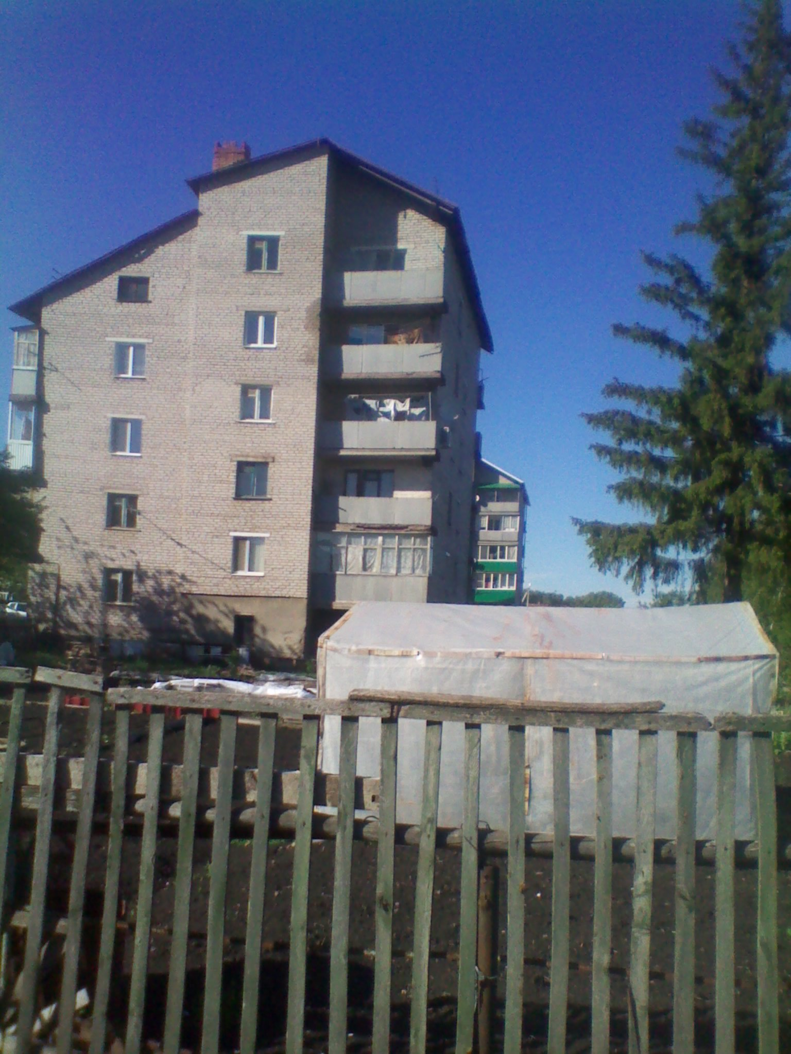 миловская 5 этажка на пересечениях гагарина и молодёжный